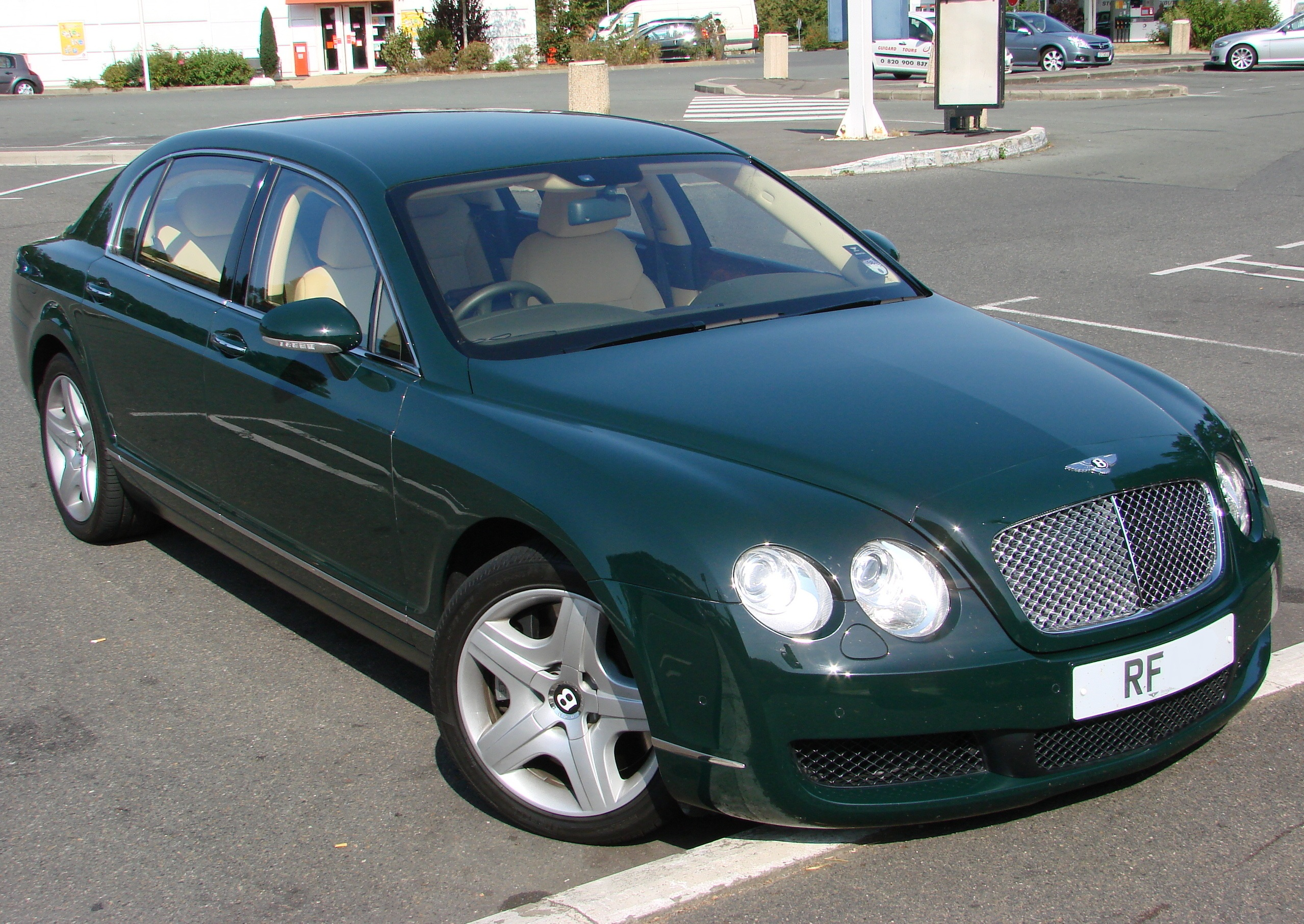 Bentley Continental Flying Spur